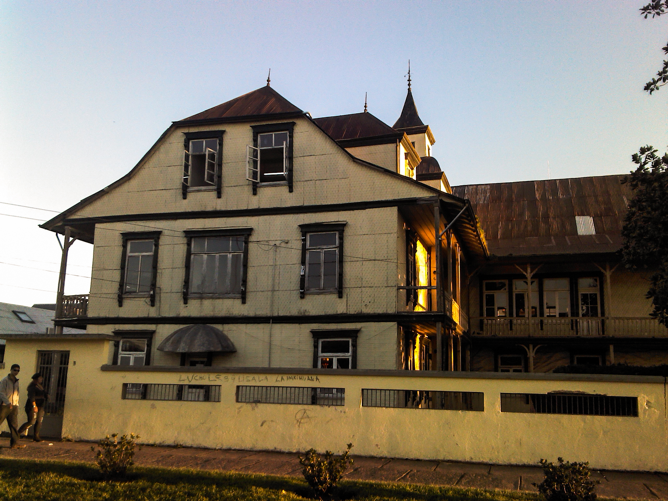 Casa Furniel This is a photo of a national monument in Chile: 2217